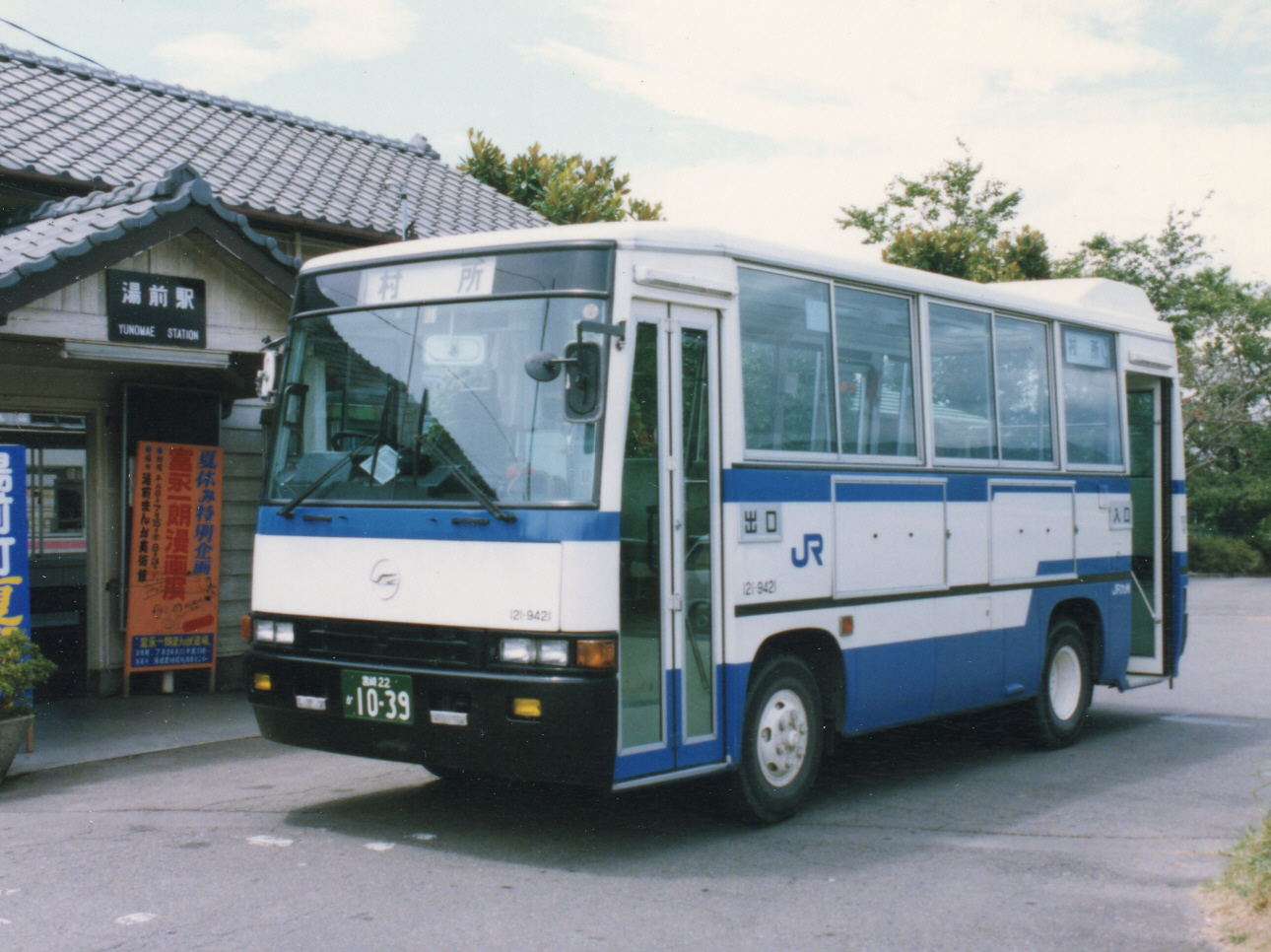 湯前駅前にて撮影